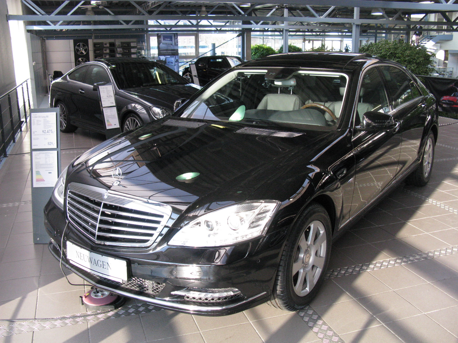 Mercedes-Benz S250 CDi W221